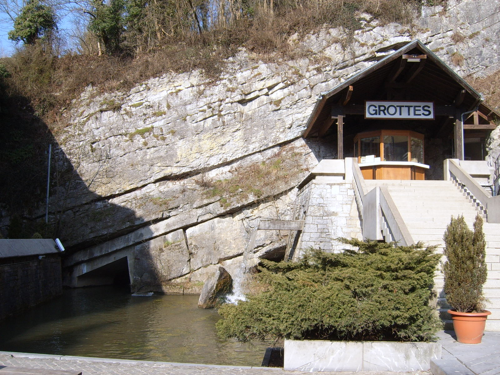 Le Rubicon et l'entrée des grottes de Remouchamps à Aywaille.